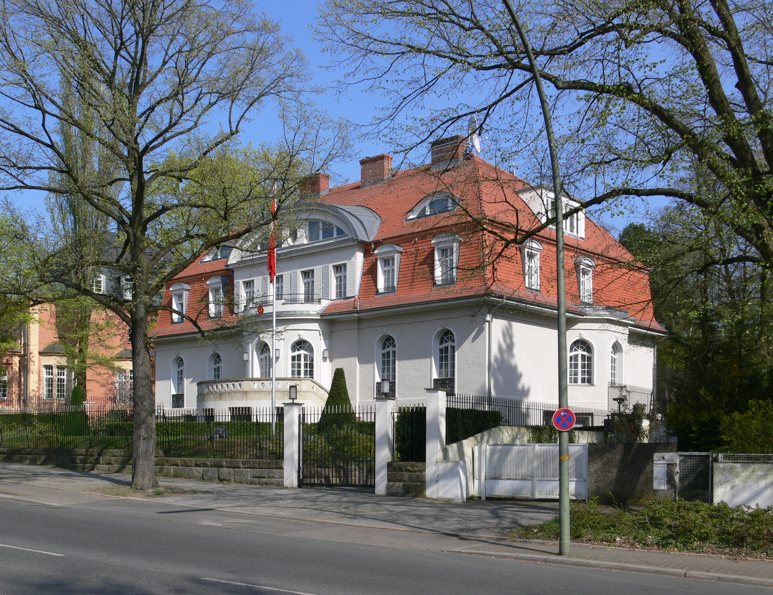 Berlin-Grunewald, Königsallee 64, Residenz des türkischen Botschafters (ehem. Bankiersvilla)